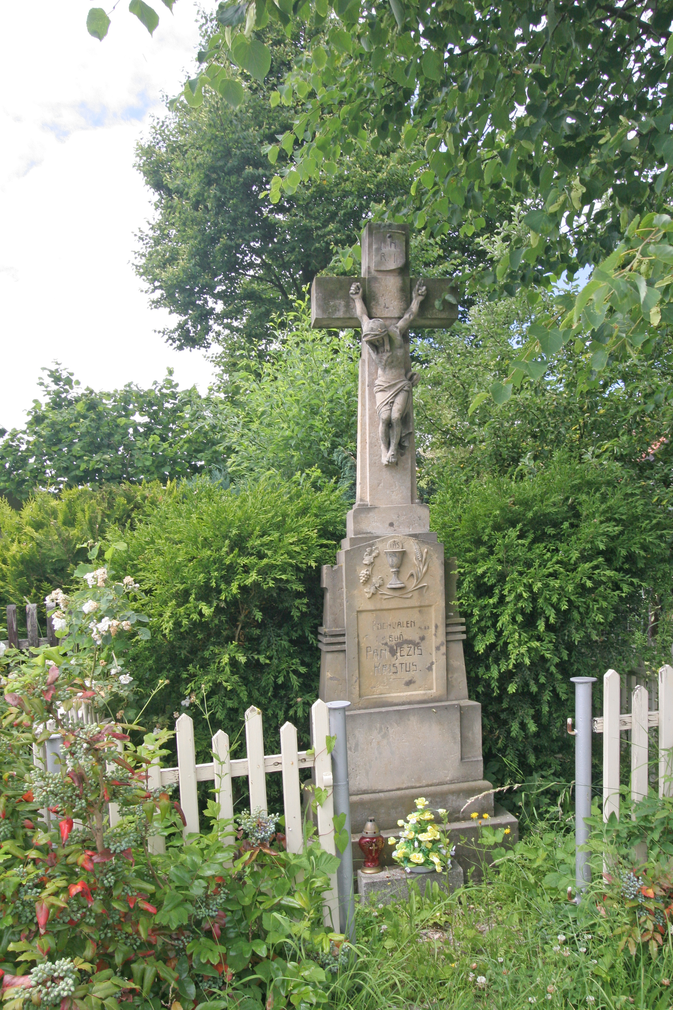 Drahoš křížek